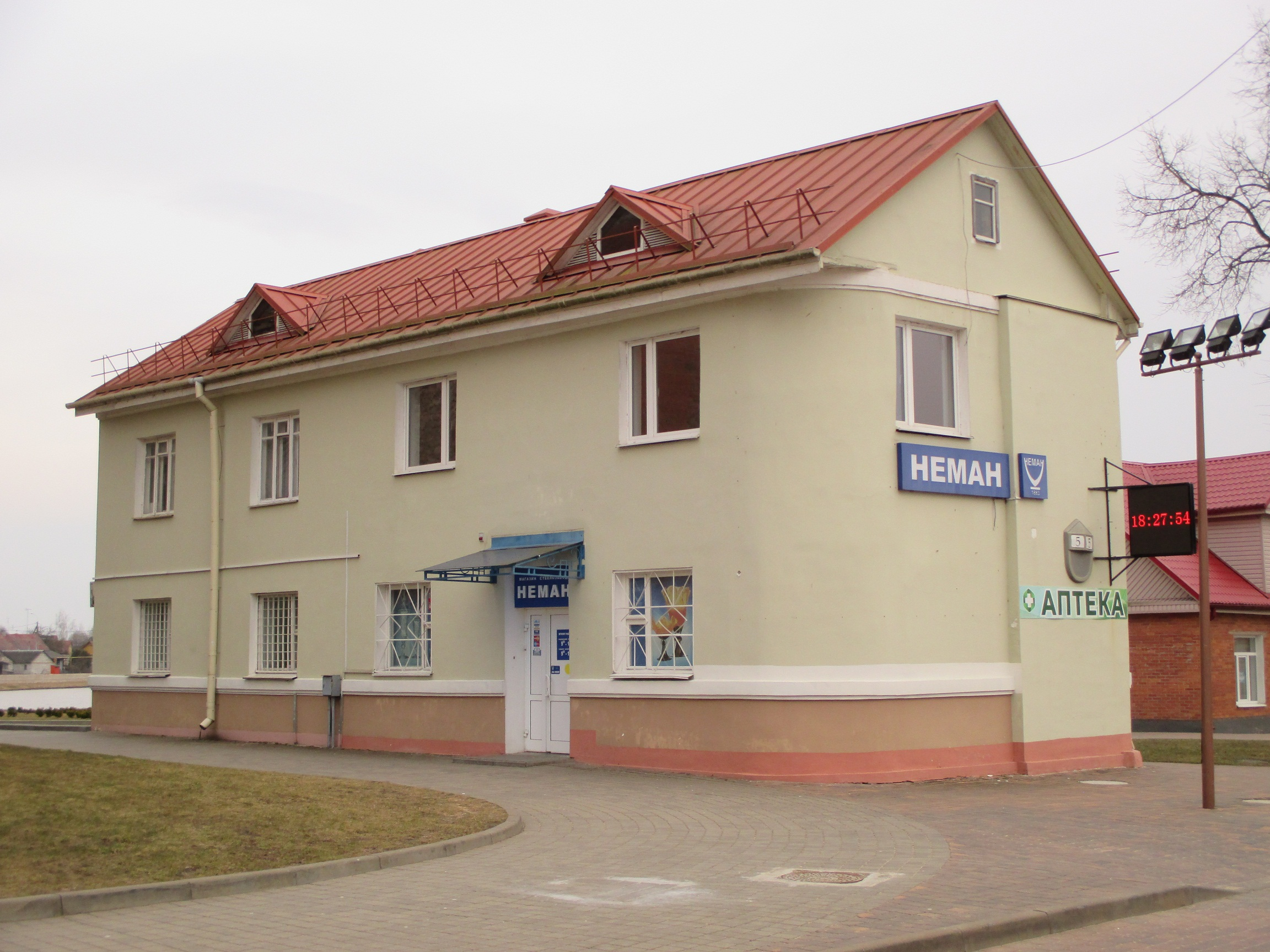 Беларусь, Ліда, Замкавая вуліца